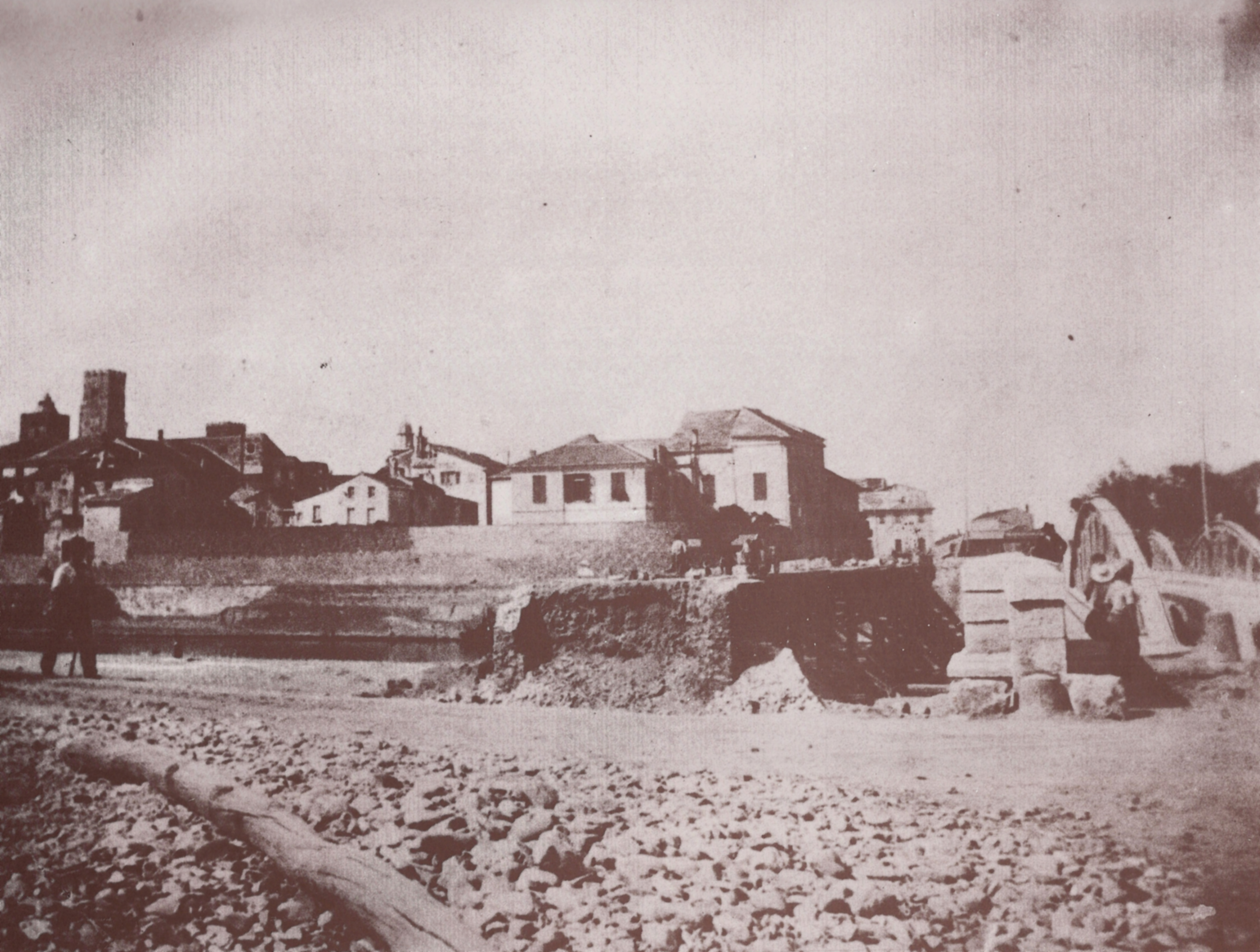 La costruzione del nuovo ponte di ferro ad inizio del 1900